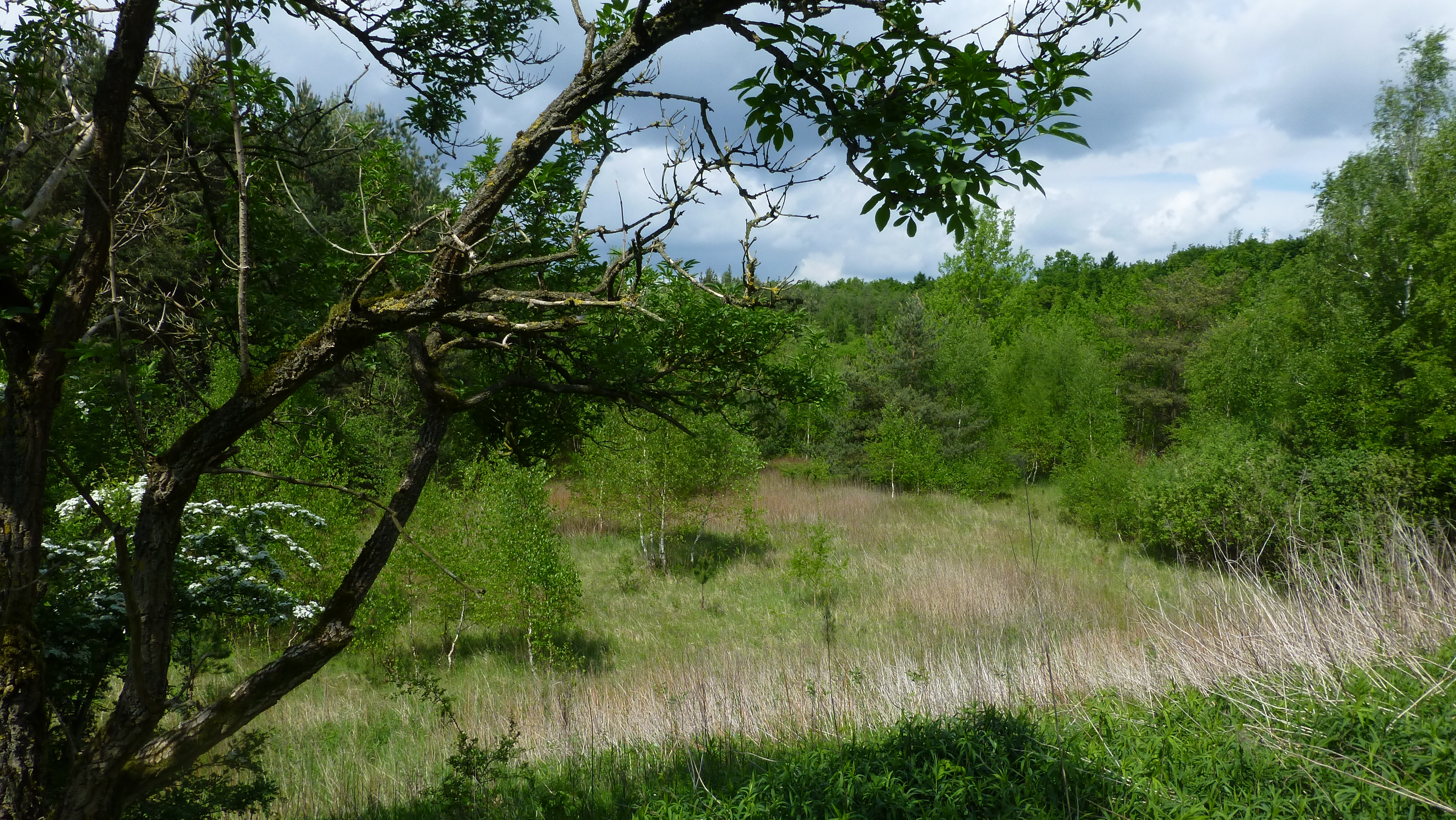 Blick hinunter in die ehemalige Sandgrube im Altwarmbüchener Moor. (Die Sandgrube ist zugleich registriert als Geotop 362508)